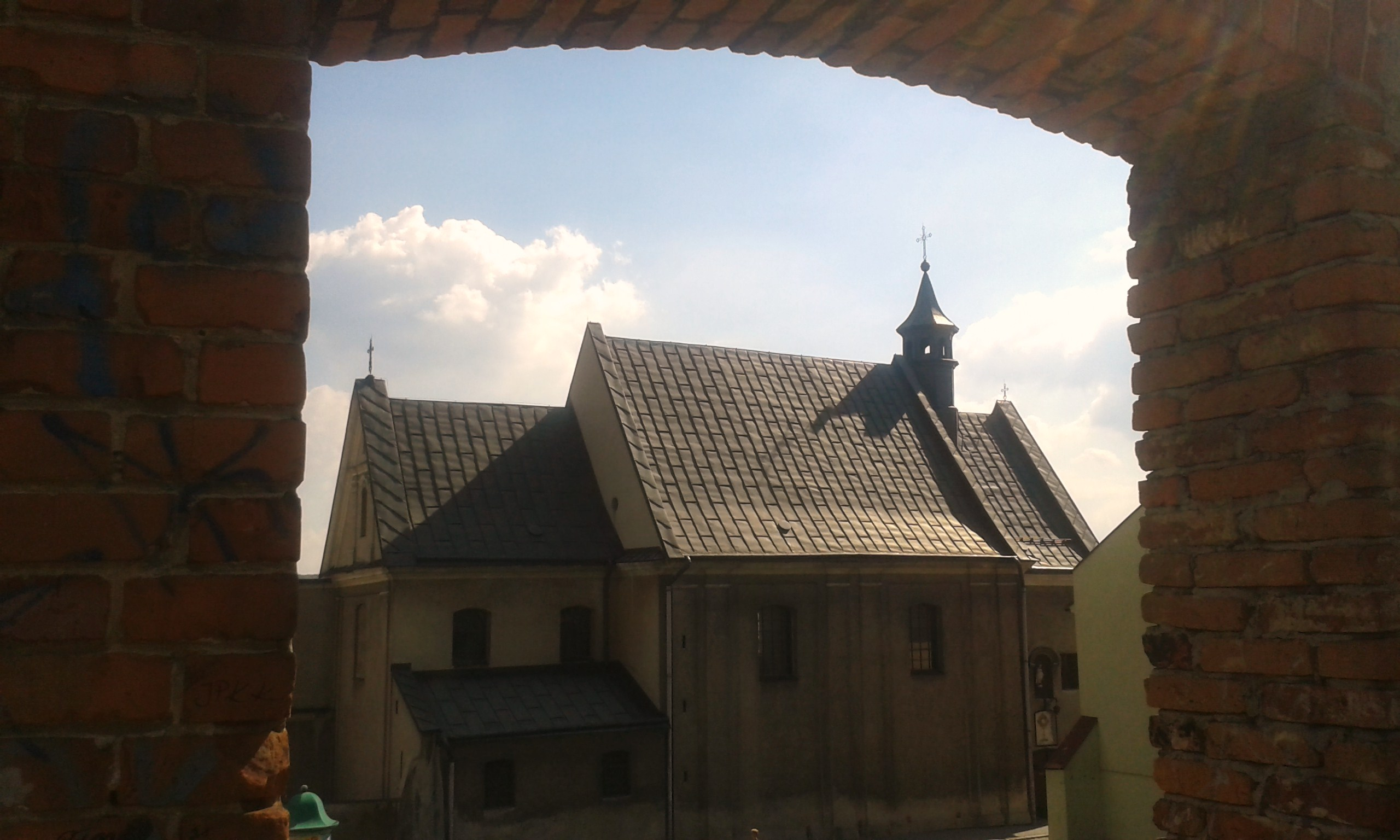 Tarnów, zespół klasztorny bernardynek, ob. bernardynów, XVIII